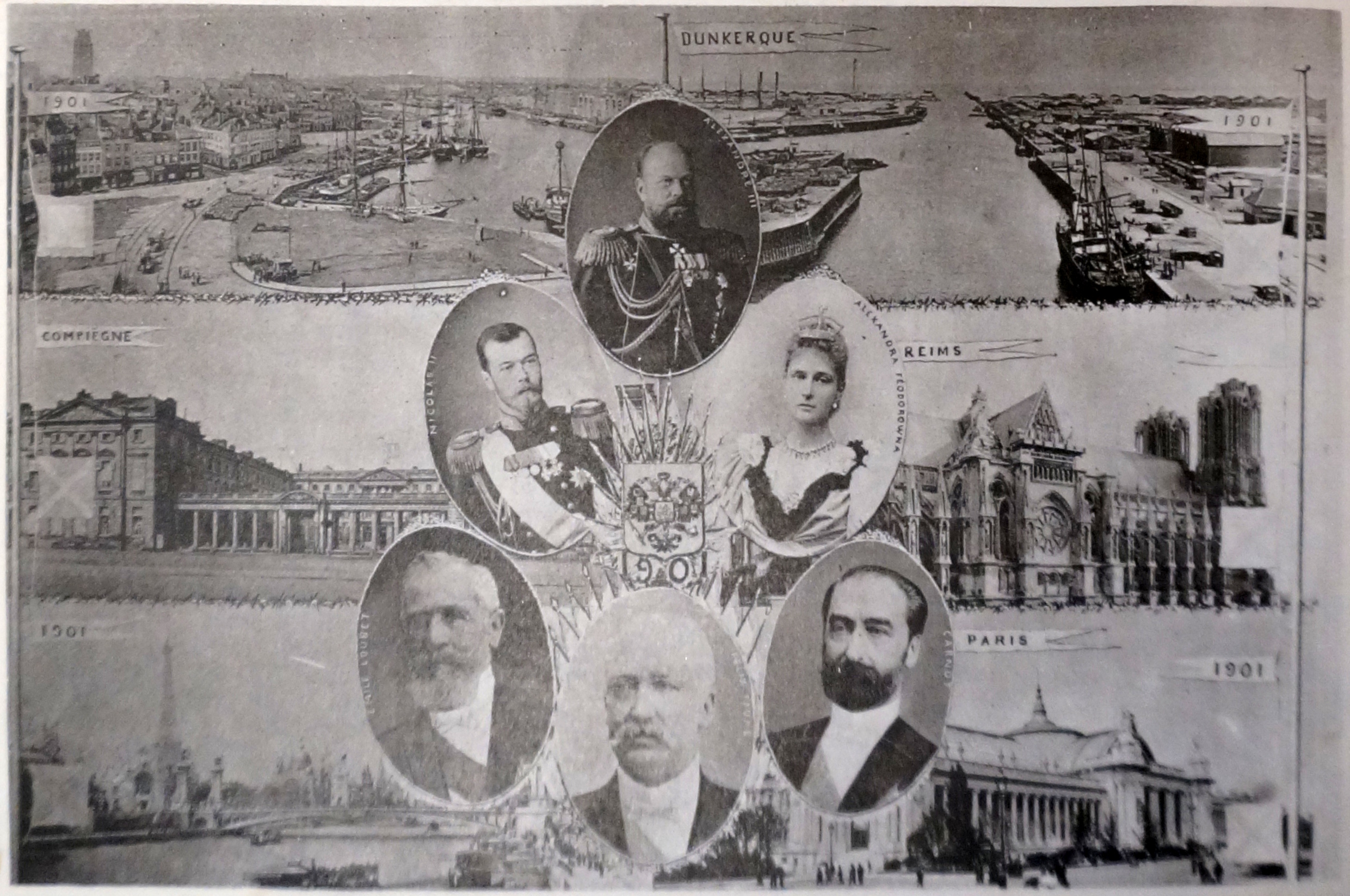 Lors des Grandes manoeuvrves de l'est de 1901, cartes posatles de 1901 de la BM de Reims sous la cote CPA t4.